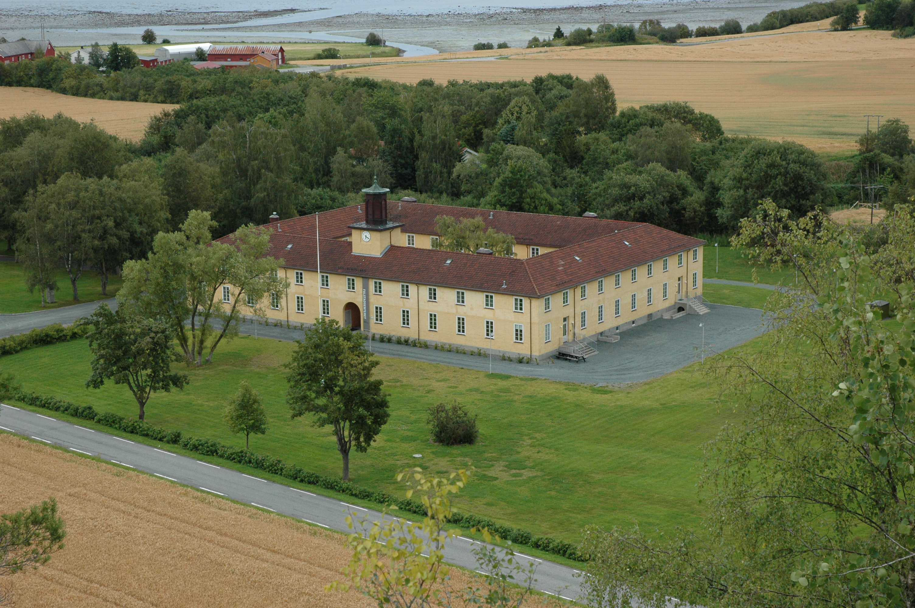 Falstadsenteret 2008 The Falstad Centre 2008 Fotograf: Ingeborg Hjorth / Falstadsenteret